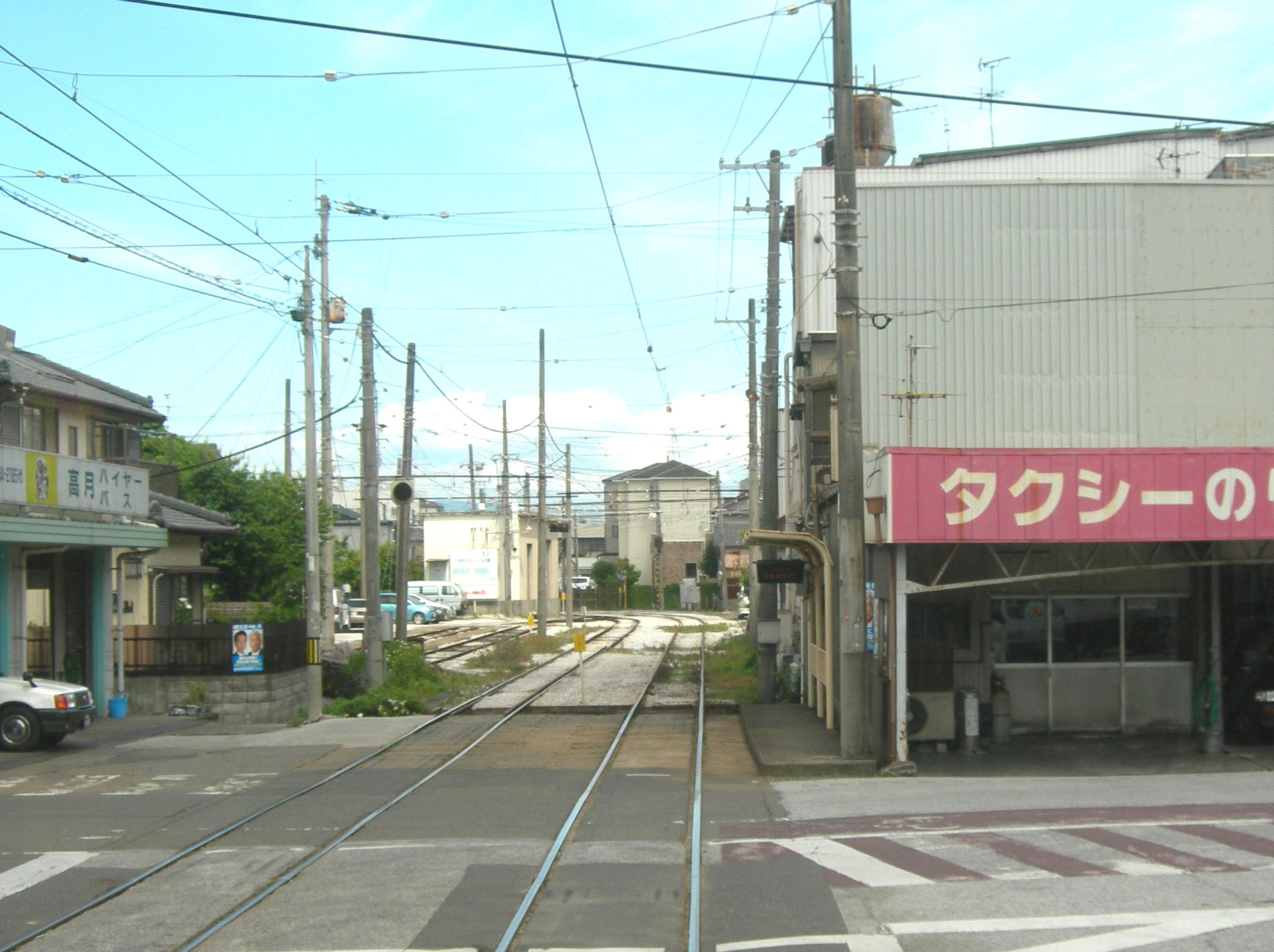 土佐電気鉄道後免東町電停。